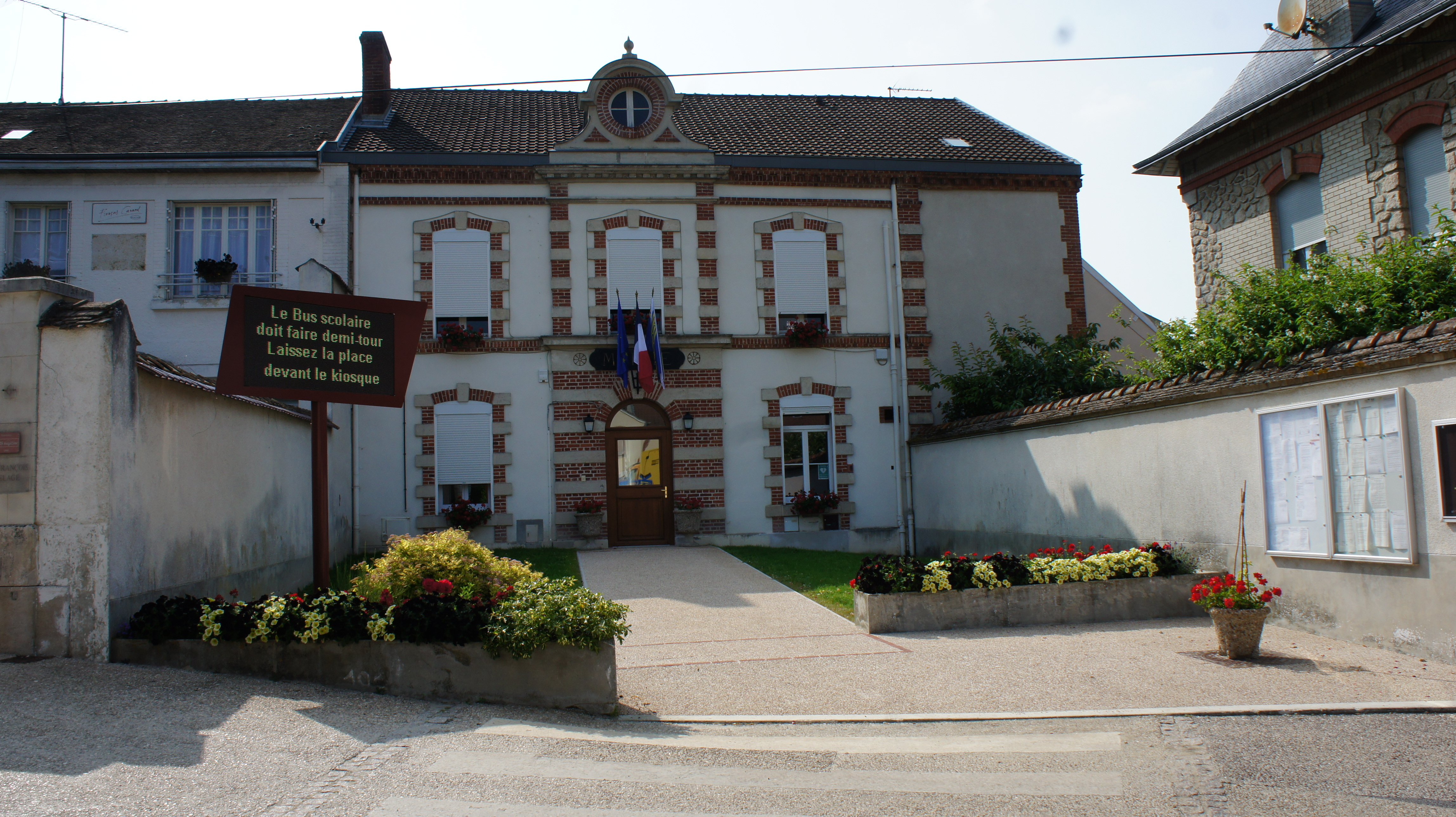 L'Hôtel de ville à Ludes .